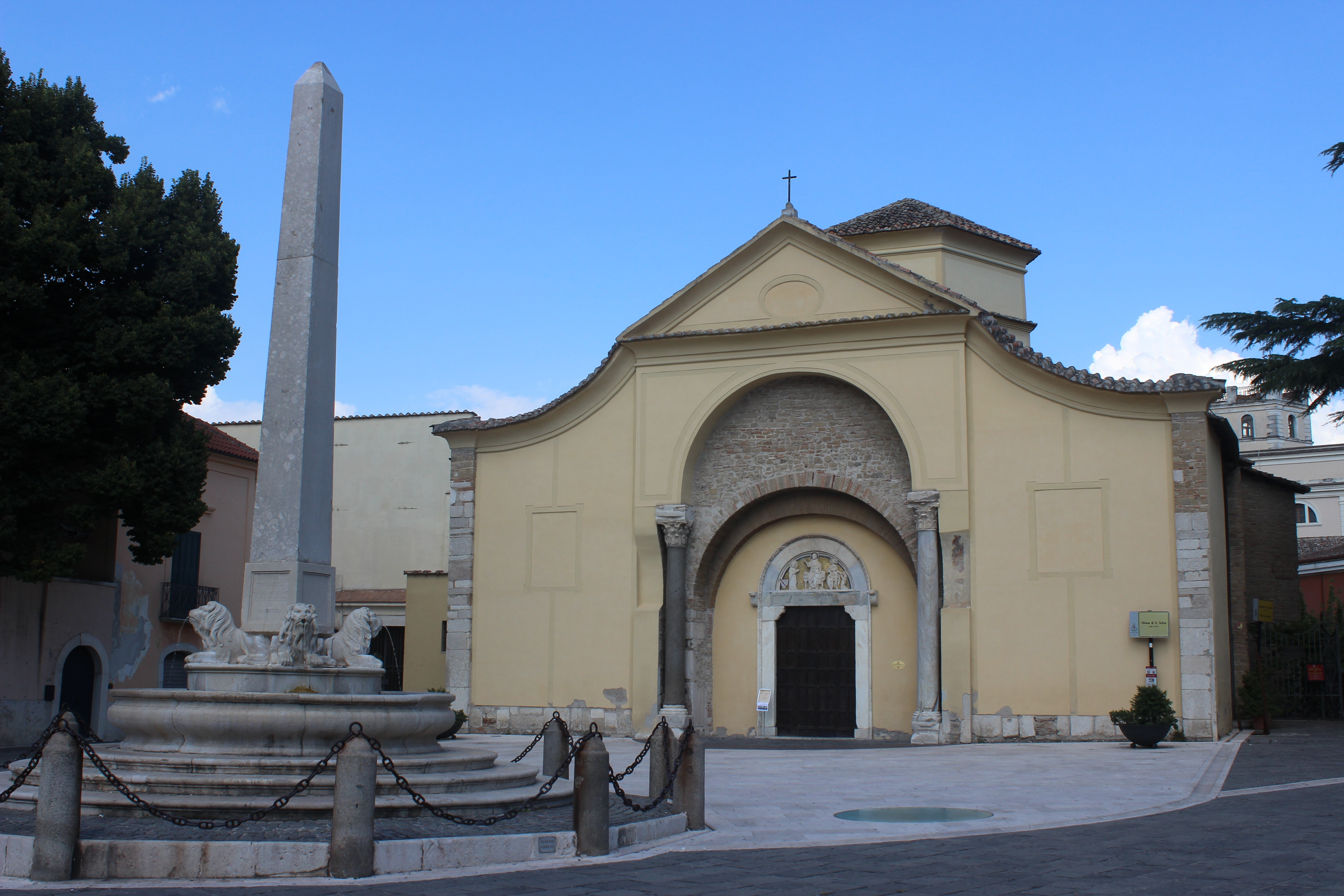 Benevento. Santa Sofía. Exterior.